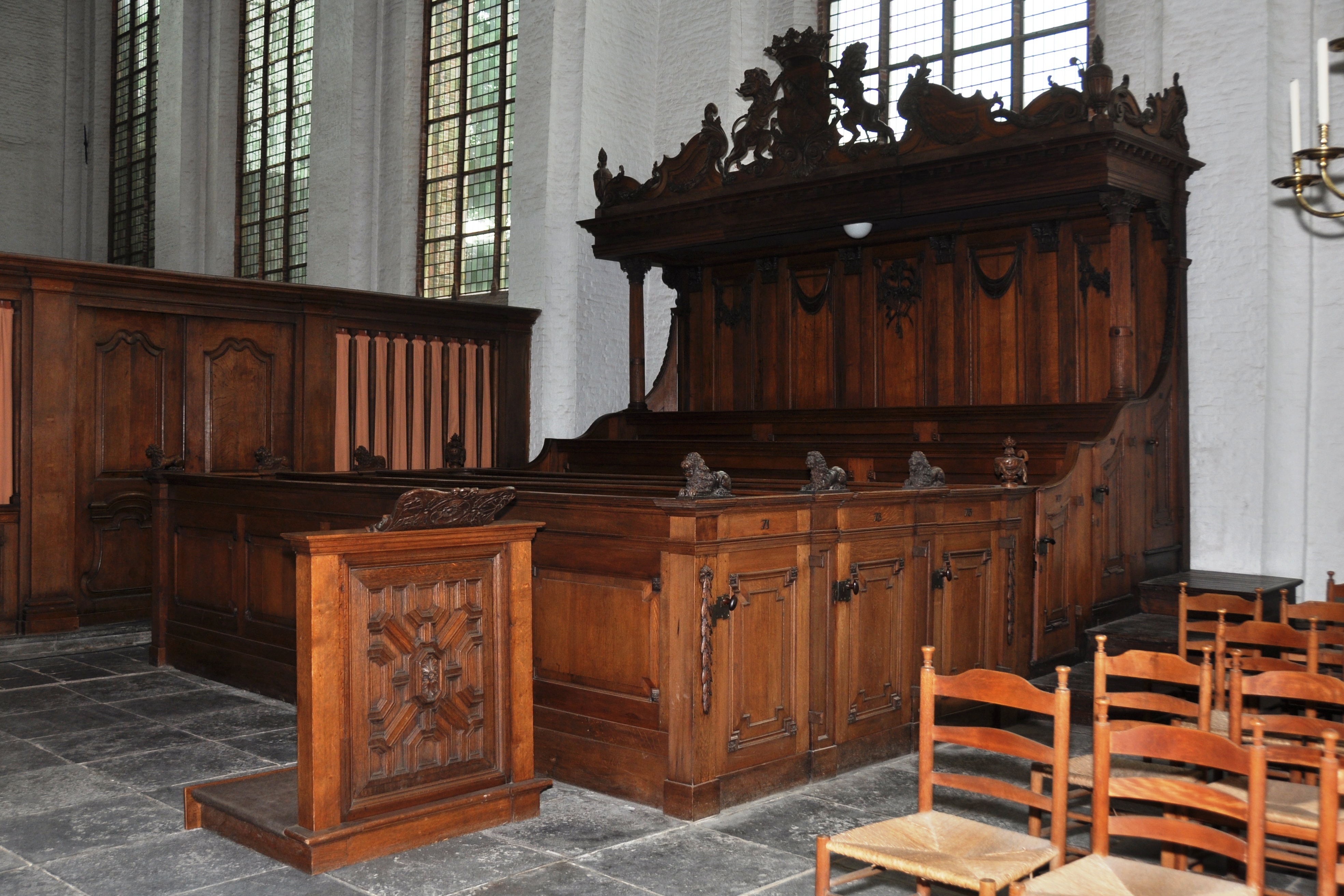 Interieur van de Grote of St. Janskerk in Schiedam.